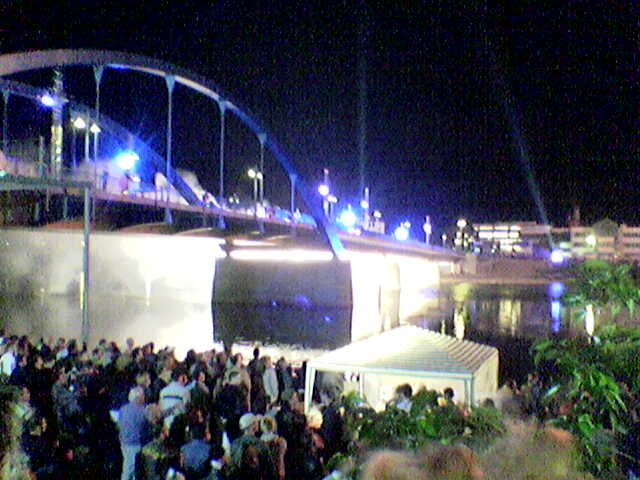 Feuerwerk bei der Feier am 1. Mai 2004 zur EU Osterweiterung in Frankfurt (Oder) an der Grenzbrücke zu Polen